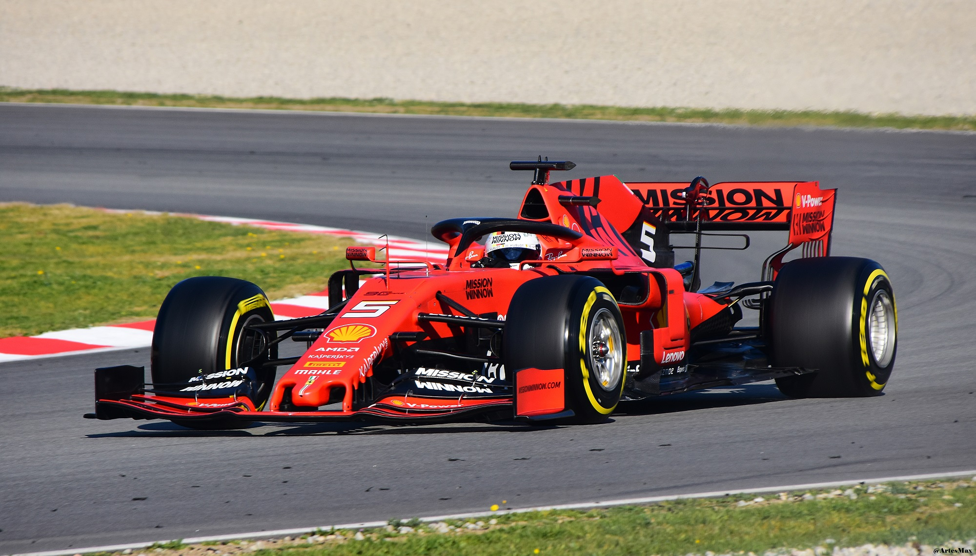 FERRARI SF90 / Sebastian Vettel / GER / Scuderia Ferrari